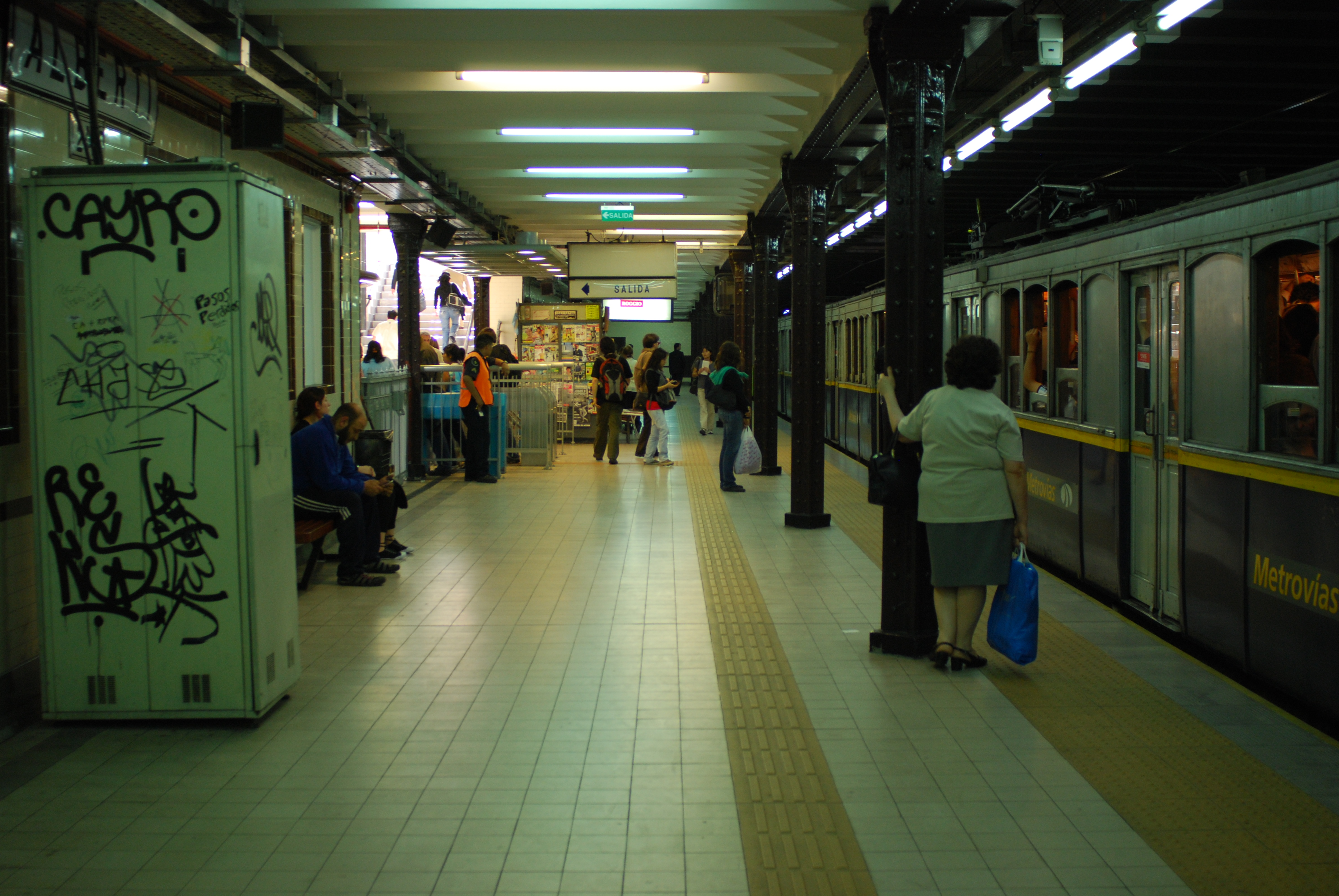 Único andén de la estación Alberti de la línea A de subtes en Buenos Aires, Argentina (diciembre 2008)